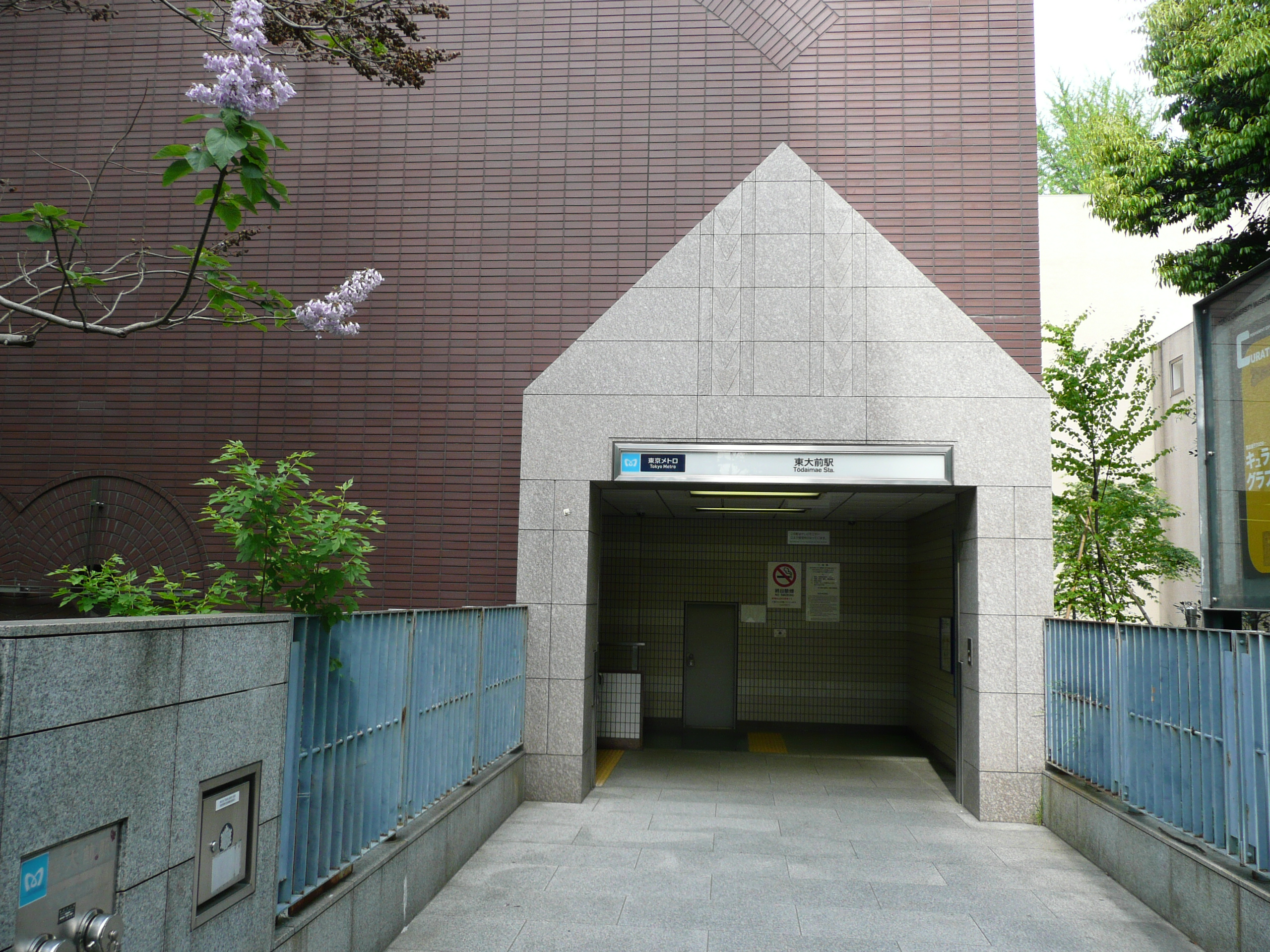 東大前駅1番出入口